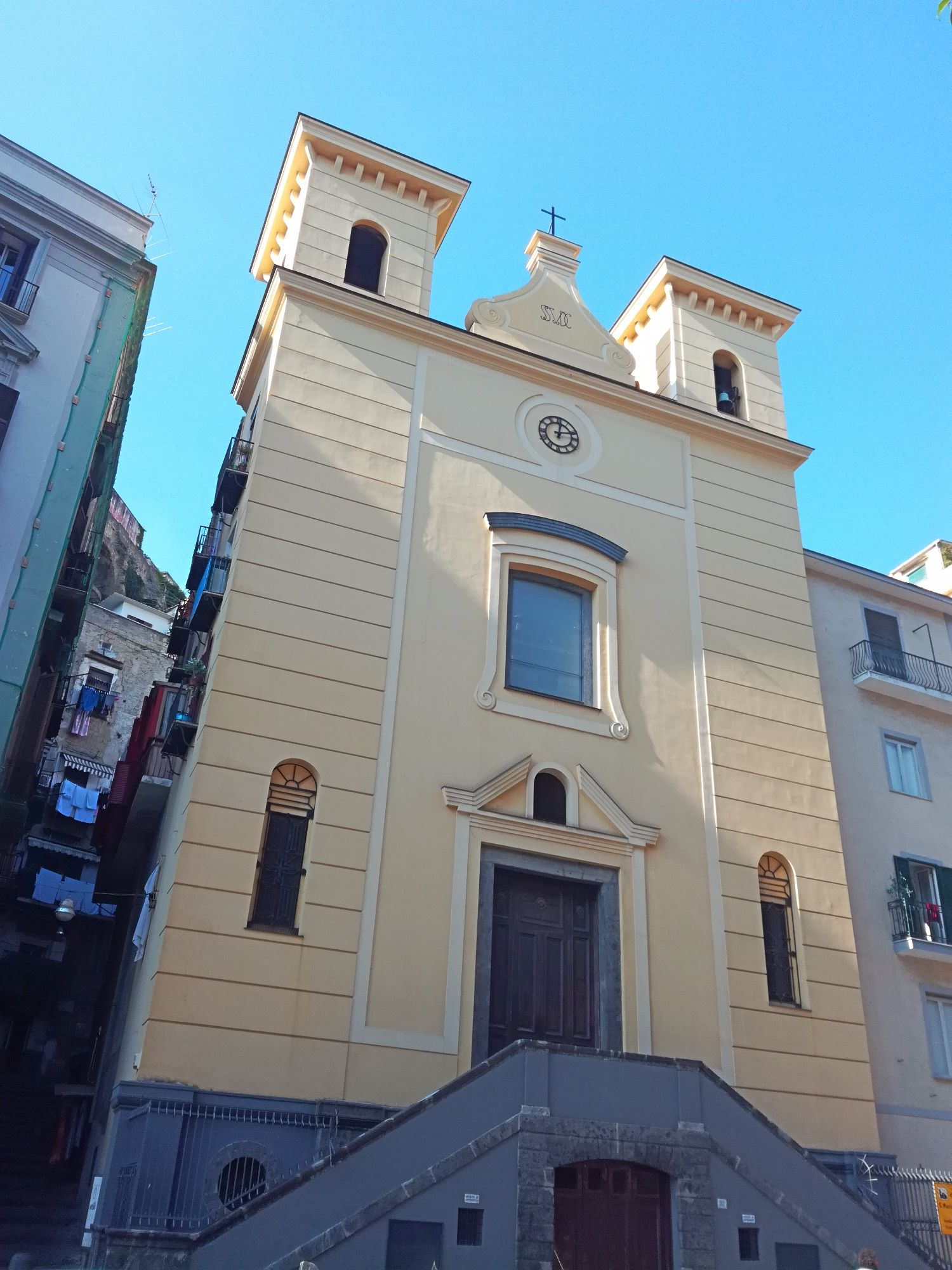 Maria della Catena (Napoli)